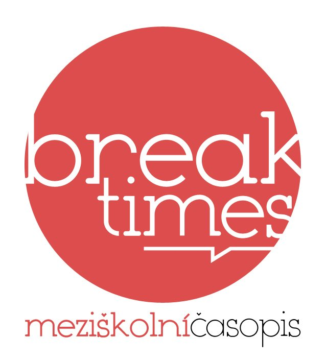 aktuální logo studentského časopisu Break Times